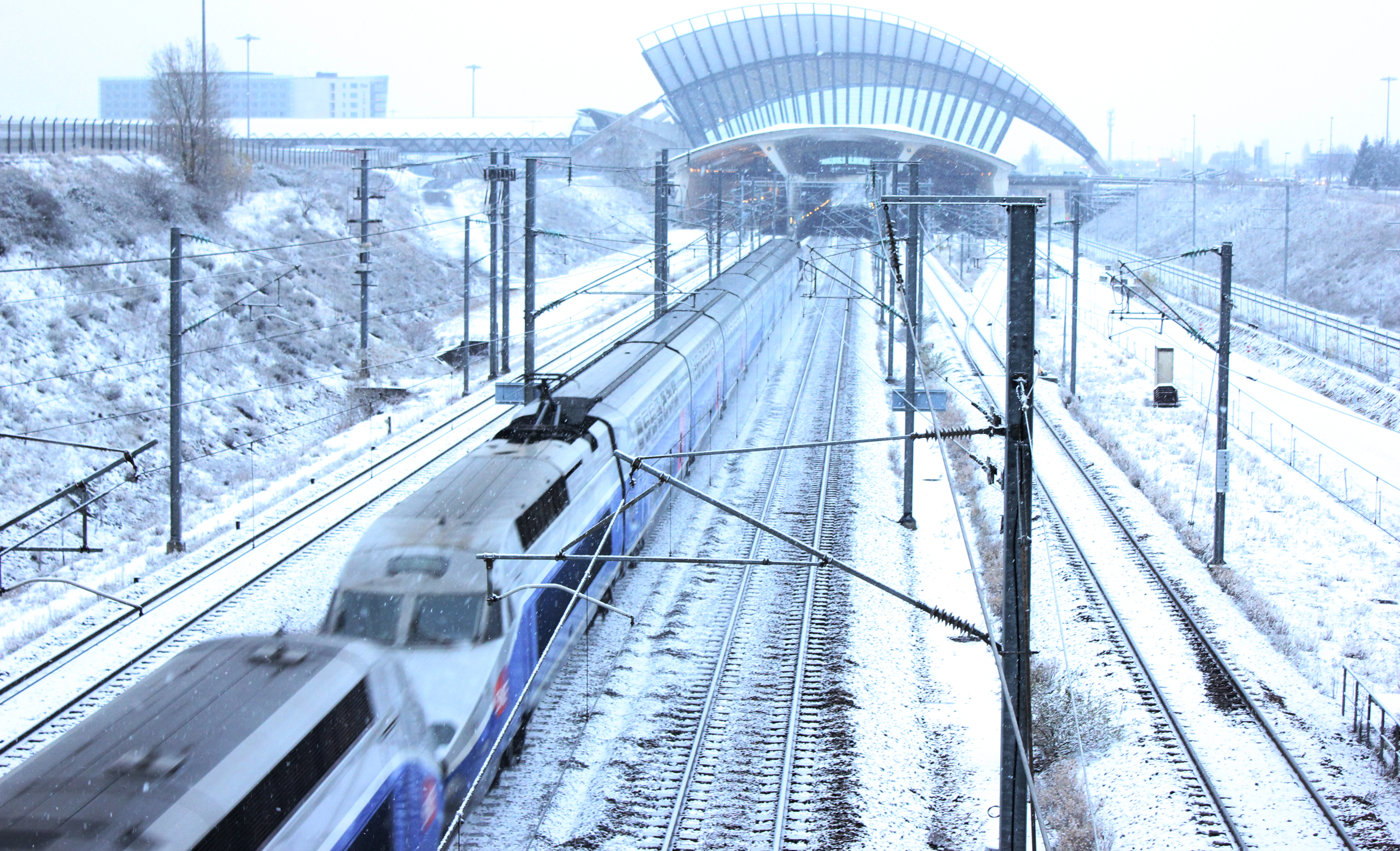 Deux TGV en unité multiple en direction du sud, passant sous le "Tube 300" de Saint-Exupéry